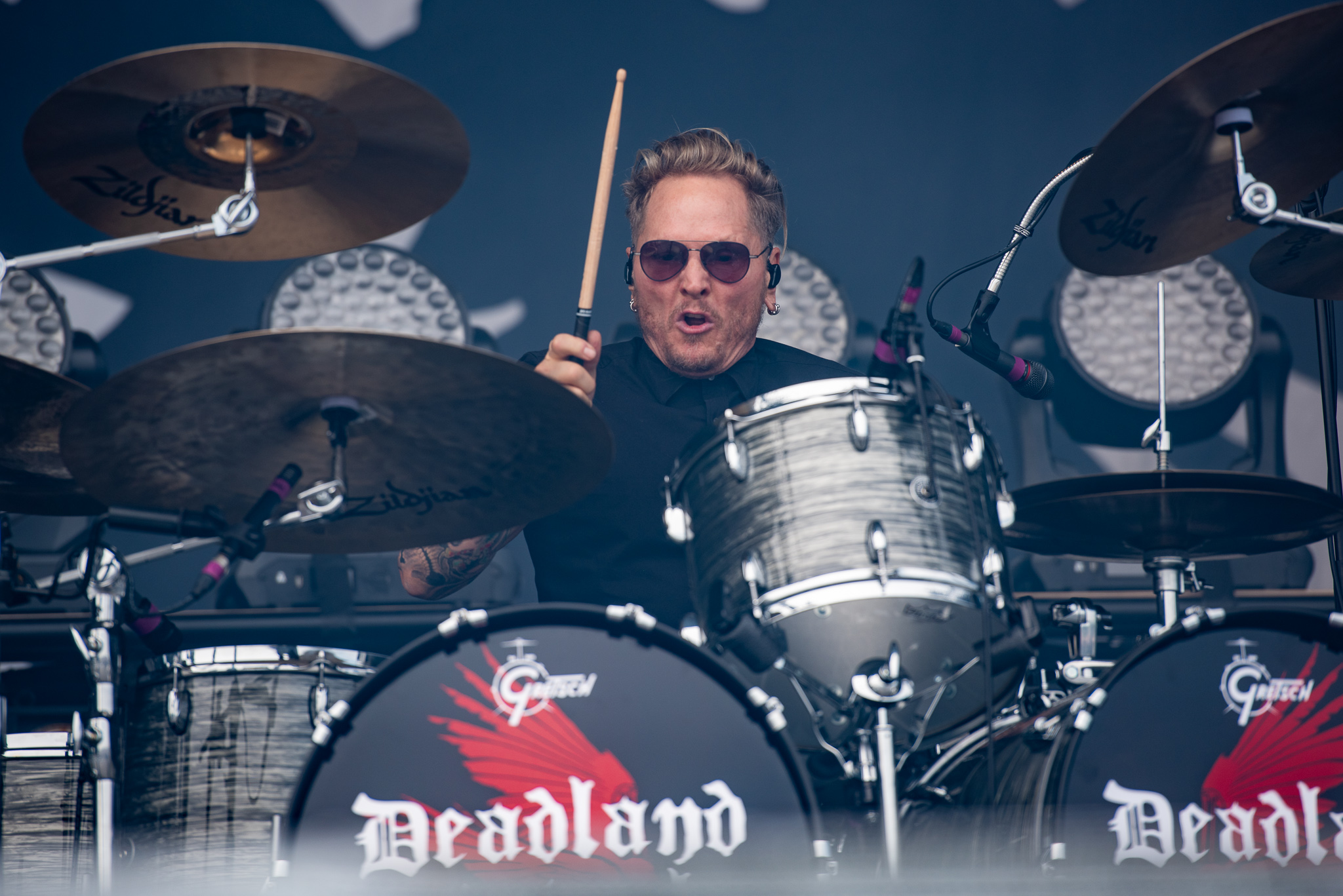 ARGO-Konzerte,Deadland Ritual,Konzert,Livekonzert,Livemusik,Matt Sorum,Musik,RiP,Rock im Park 2019,Zeppelin Stage